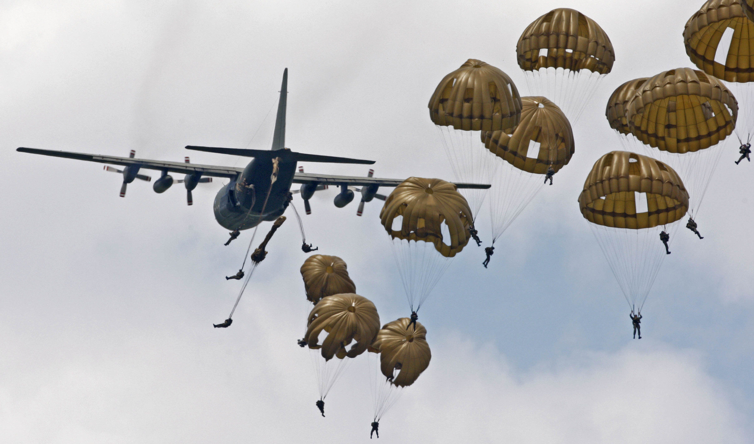 Soldaten springen mit Rundkappenschirmen aus einer C-130 "Hercules"-Transportmaschine ab.